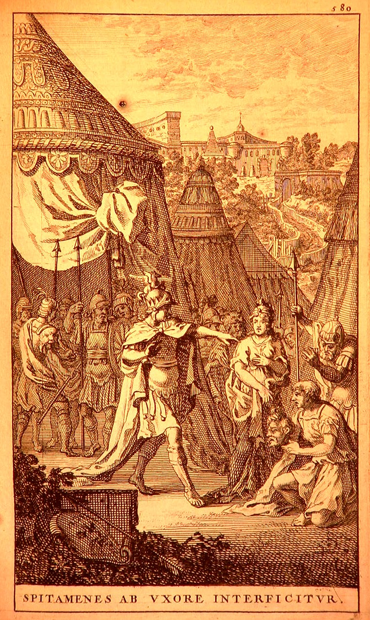 Alexander old drawings